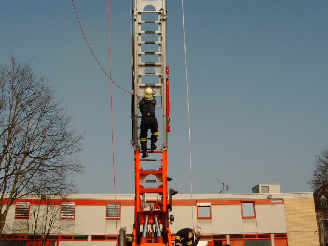 Höhengewöhnungsübung in Zusammenarbeit mit der Bundespolizei- Höhenrettung